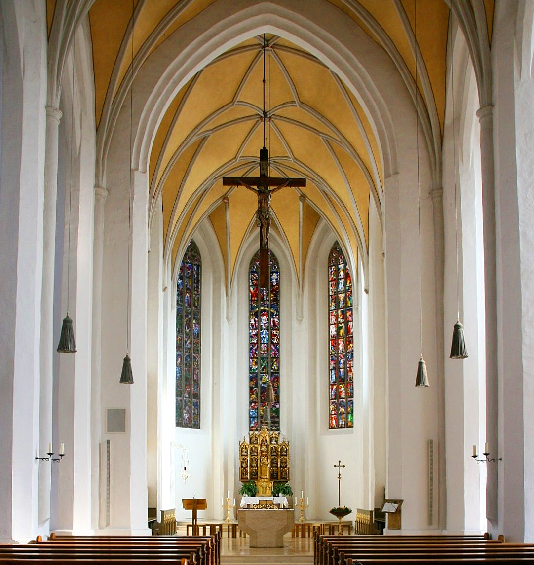 Der Innenraum der Stadtpfarrkirche Maria Himmelfahrt in Vilsbiburg (Landkreis Landshut, Niederbayern). Blick durch Langhaus zum Chor der dreischiffigen spätgotischen Hallenanlage.